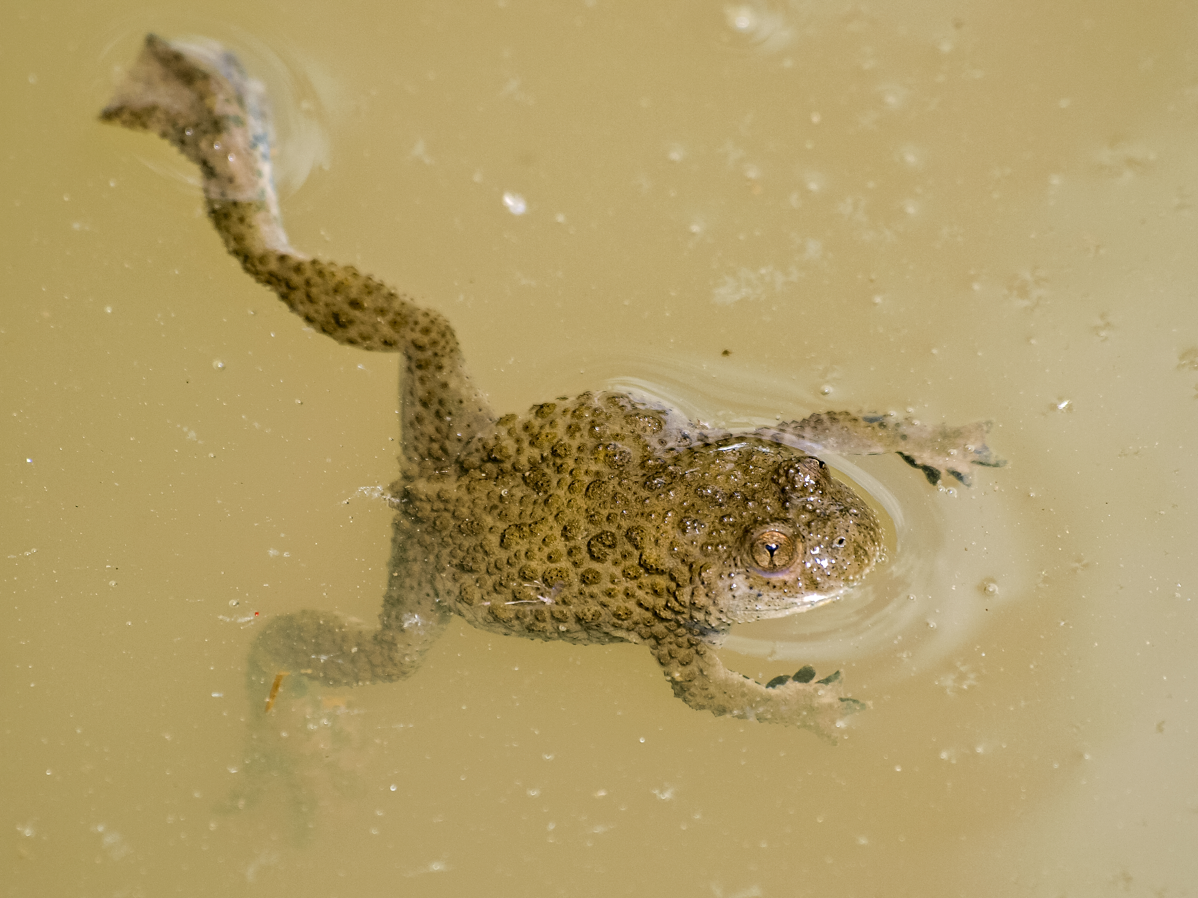 Gelbbauchunke (Bombina variegata) im Naturschutzgebiet „Alter Steinbruch Liekwegen“ (NSG HA 212), Landkreis Schaumburg